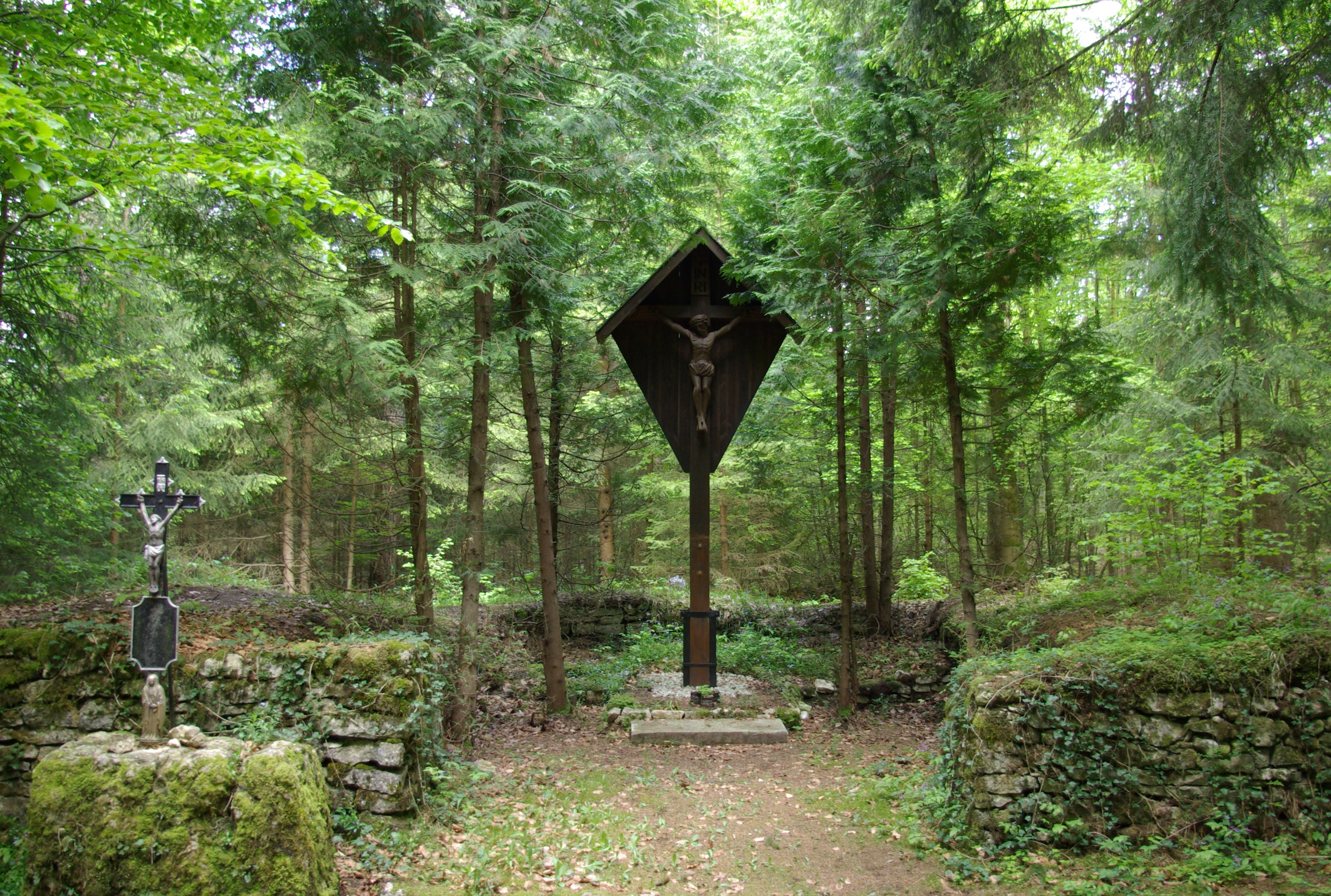 Die Pirkenreuther Kapelle im Hollenberger Wald, unterhalb der Burgruine Hollenberg. Ehemalige Wallfahrtskapelle St. Georg, 1366 erstmals urkundlich genannt, Ort Pirkenreuth und Kapelle waehrend der Hussitenkriege 1430 zerstoert, Kapelle um 1500 wieder aufgebaut, 1556/66 erneut zerstoert, Reste des Chors und des oestlichen Langhauses 1920 freigelegt. (Fl.Nr. 1549).